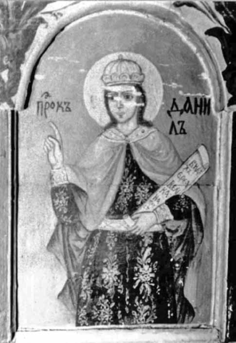 Пророк Данаил от пророческия ред в иконостаса на „Свети Архангел Михаил” в Копиловци, 1876